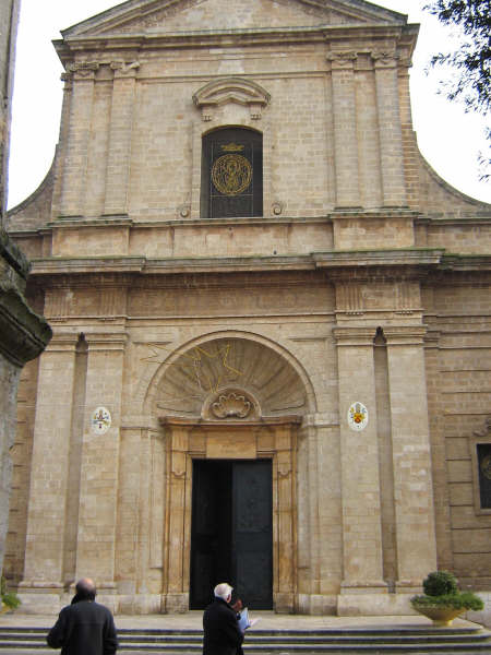 fatta da me, rappresenta la chiesa madre di san vito